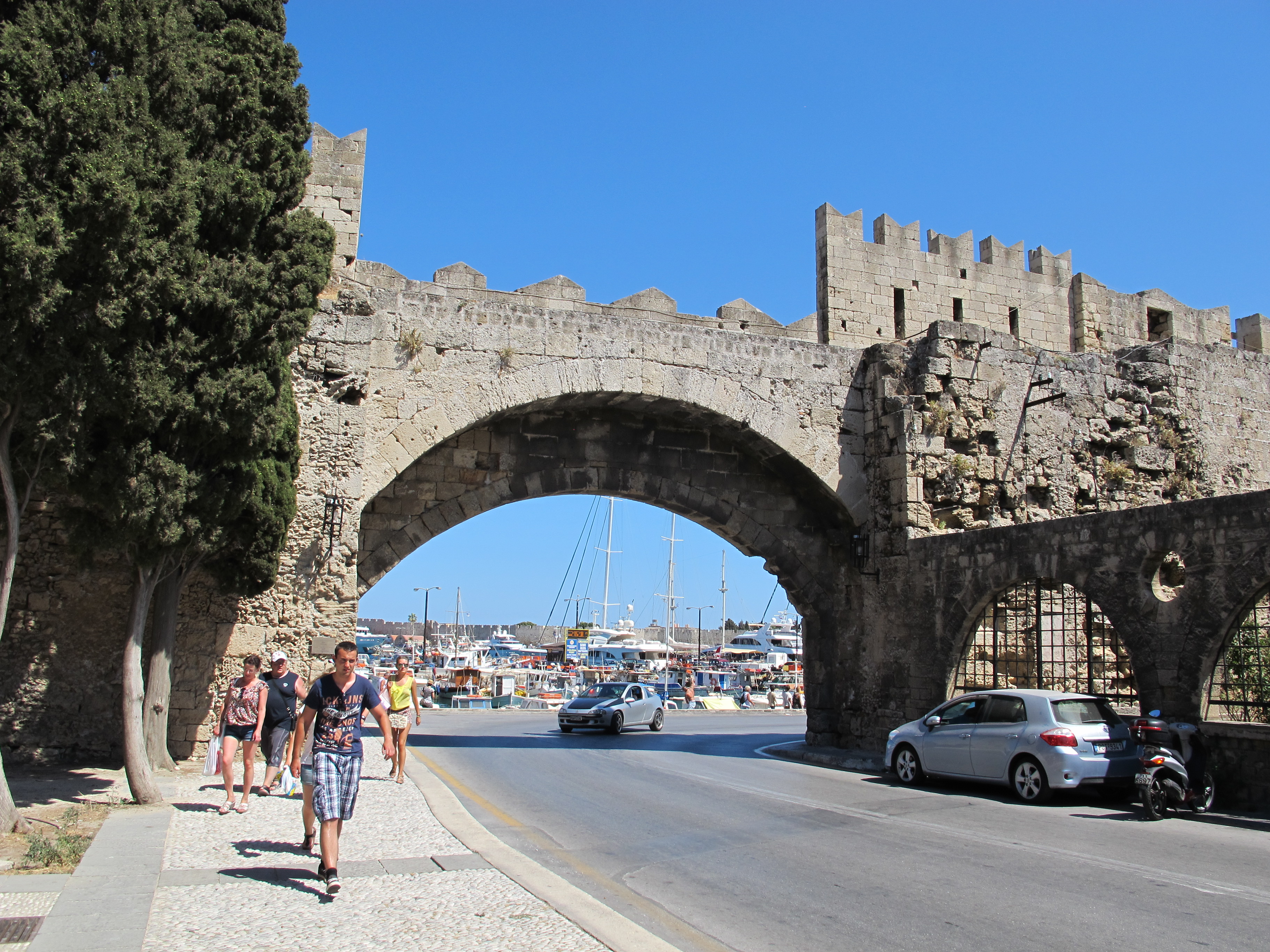 Rodi porta dell'arsenale